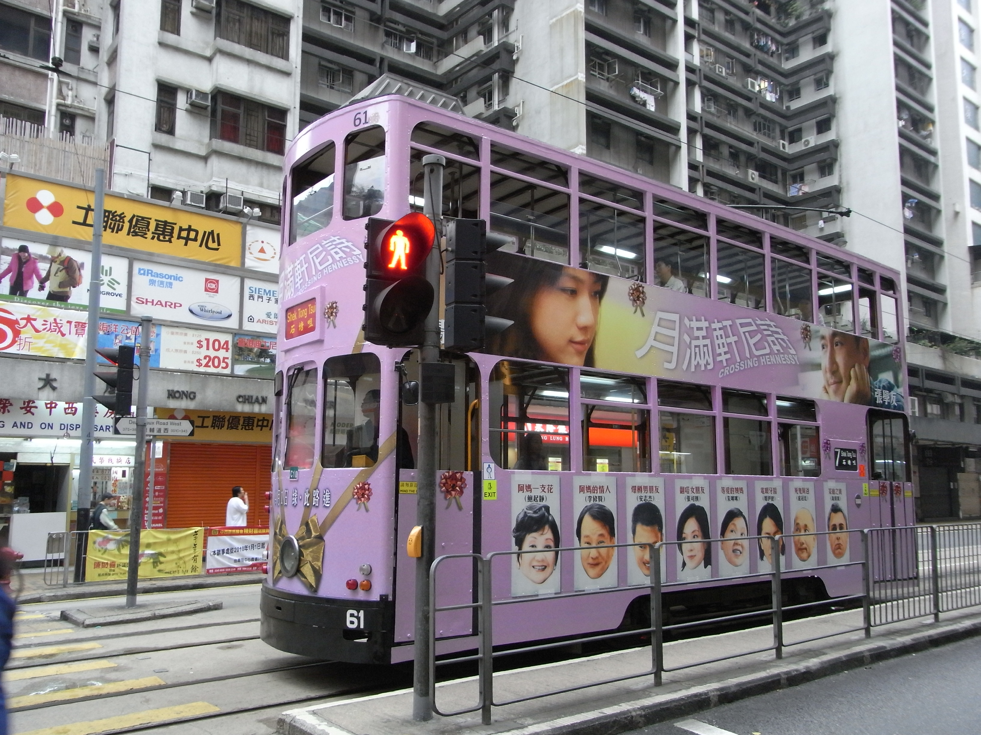 香港西營盤德輔道西，電車車身廣告 - 湯唯主演《月滿軒尼詩》